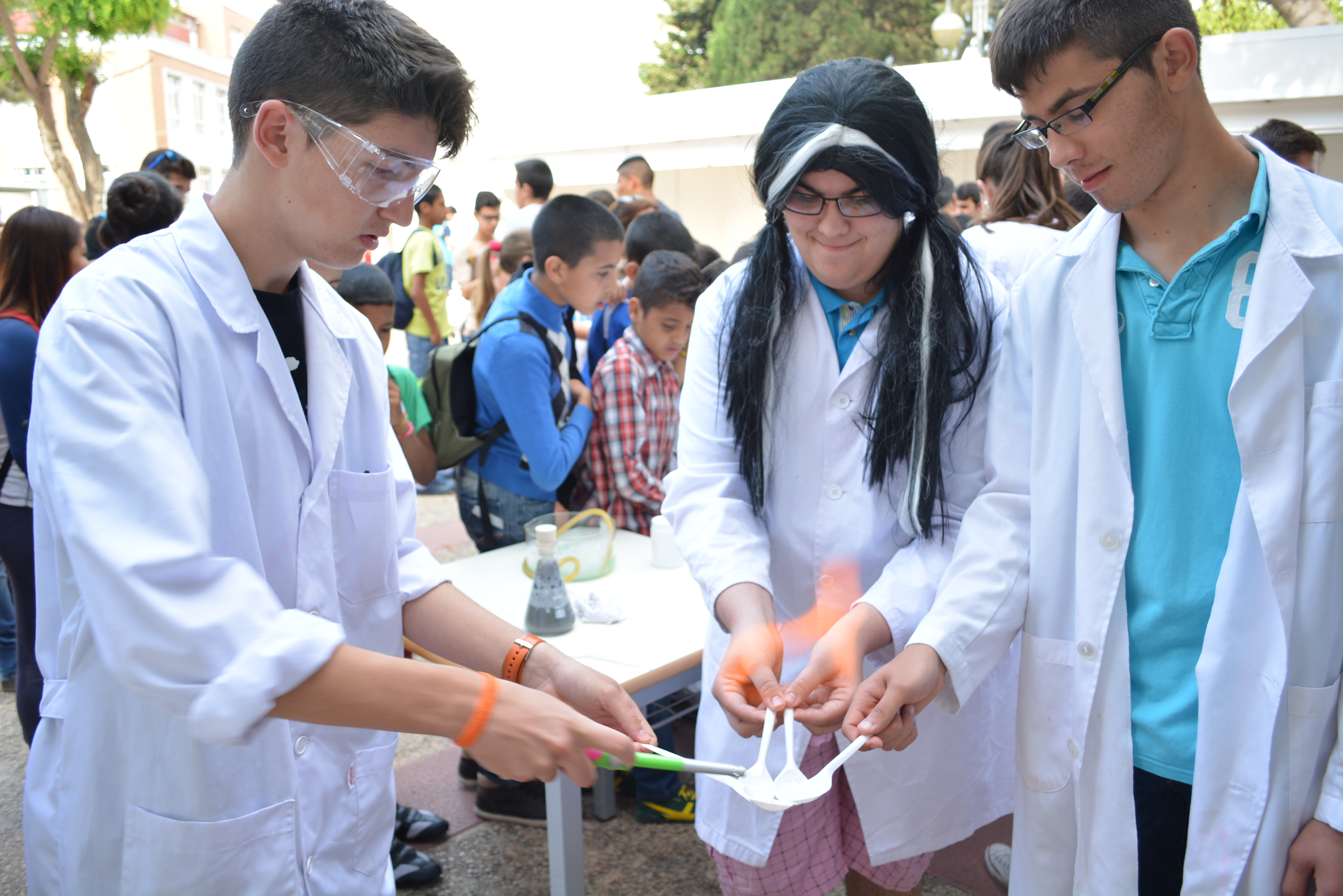 Alumnos de instituto realizando una demostración tecnológica durante el Campus de la Ingeniería de 2014.